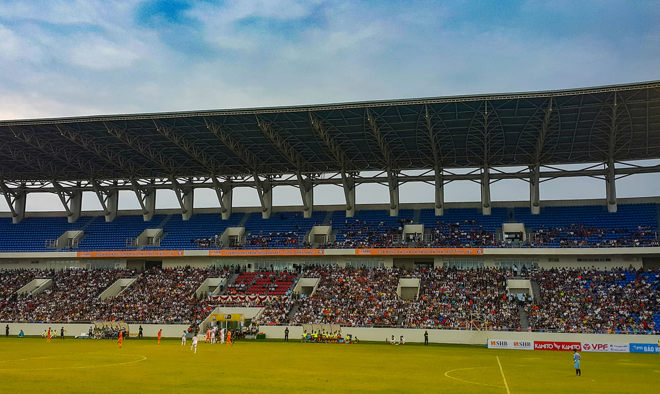 sân Hòa Xuân trong trận đấu vòng 1 vleague 2019 SHB Đà Nẵng vs Viettel